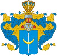 Герб рода Глинка